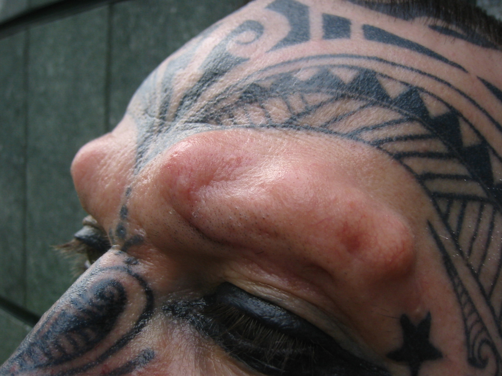 implants